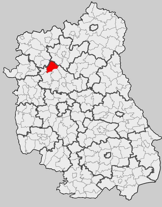 Map of gmina Kock, Lubartów county, Lublin voivodship Mapa gminy Kock, powiat lubartowski, województwo lubelskie